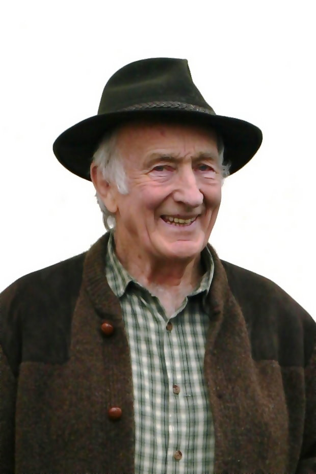 Den Heng Freylinger am Mäerz 2008.